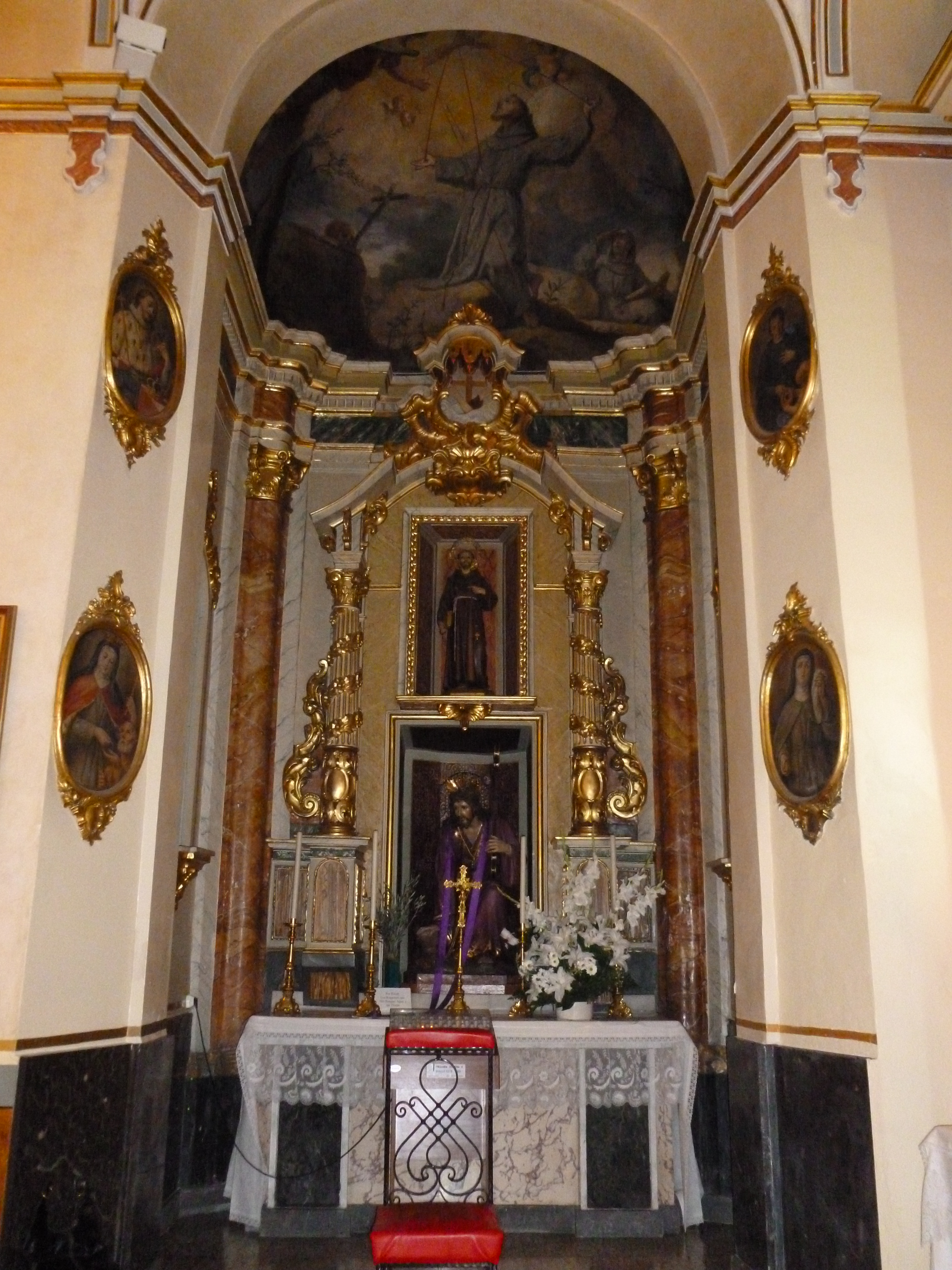 Capella de Jesús Natzaré de l'església del Sant Àngel Custodi de la Vall d'Uixó (Plana Baixa), amb la Impressió de les llagues a Sant Francesc d'Assís al turó d'Alvèrnia, a la volta, i els medallons de Sant Lluís de França, Santa Elisabet d'Hongria, Santa Margarida de Cortona i Sant Josep de Calassanç (ca. 1769), obres de Josep Vergara.